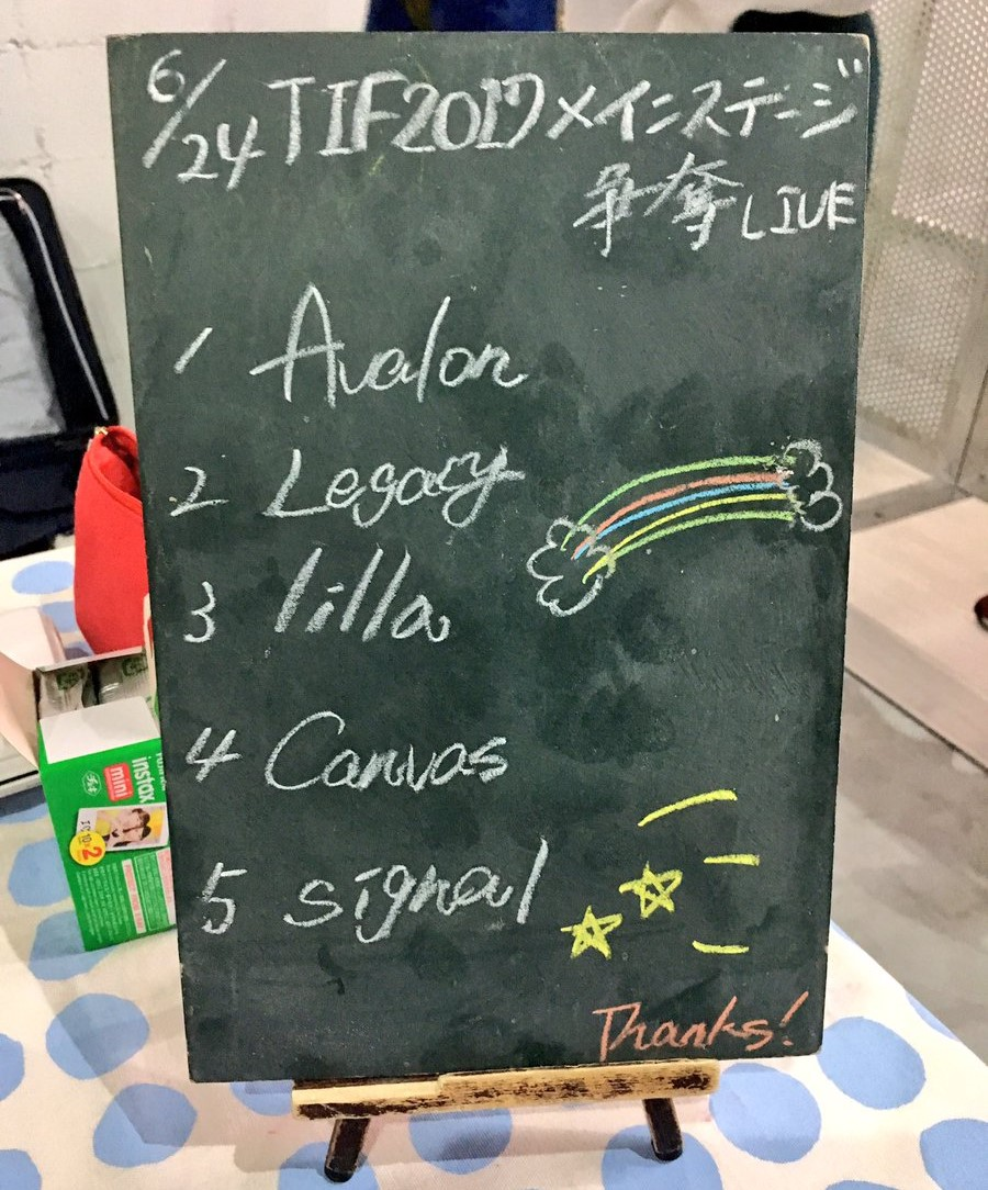 amiinAセトリボード(20170624(1))